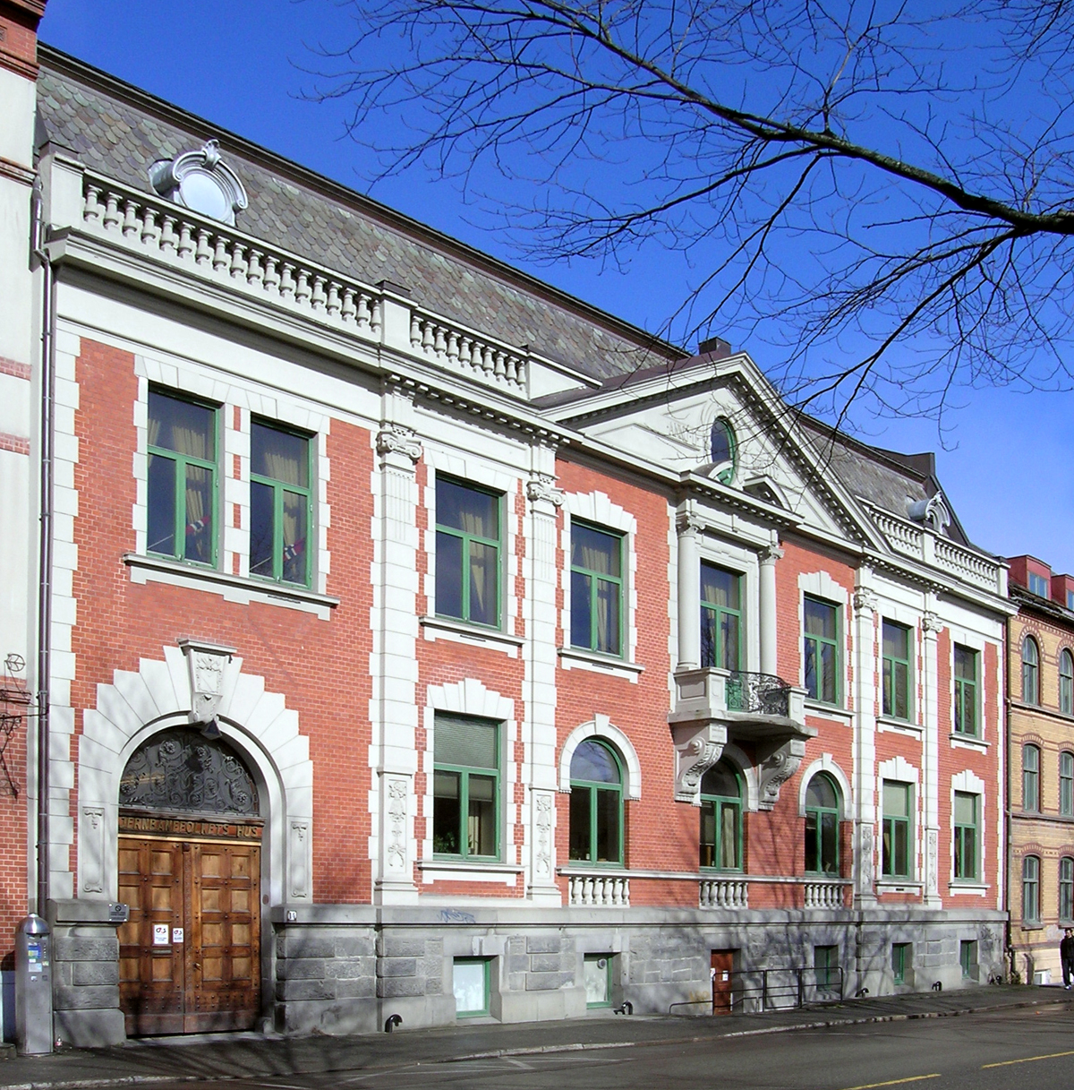 Huitfeldtgården, Kjøpmannsgata 14, Trondheim. Bygd 1900. Arkitekt: Axel Guldahl d.e.